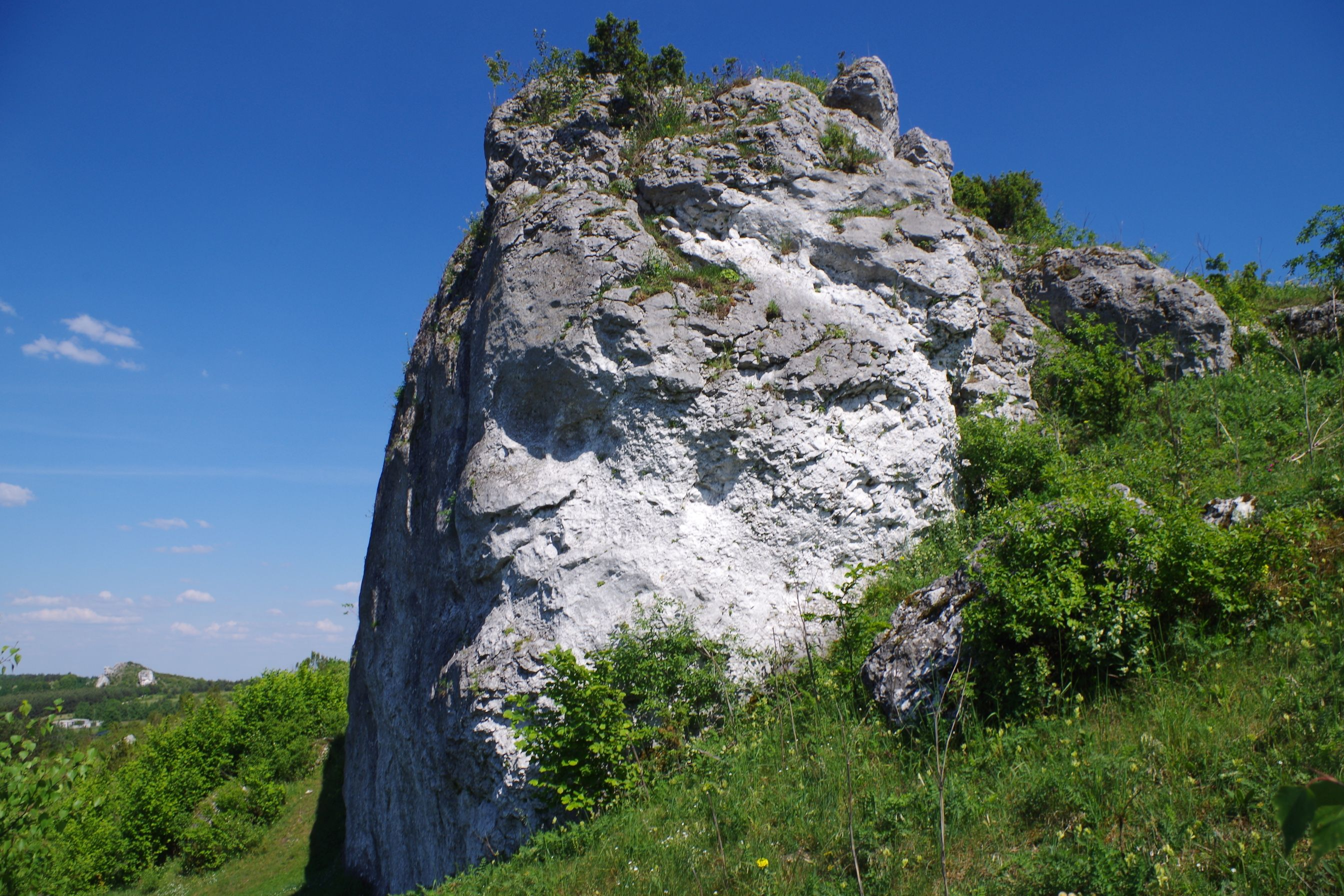 Skała Płetwa na wzgórzu Lipówki w Olsztynie